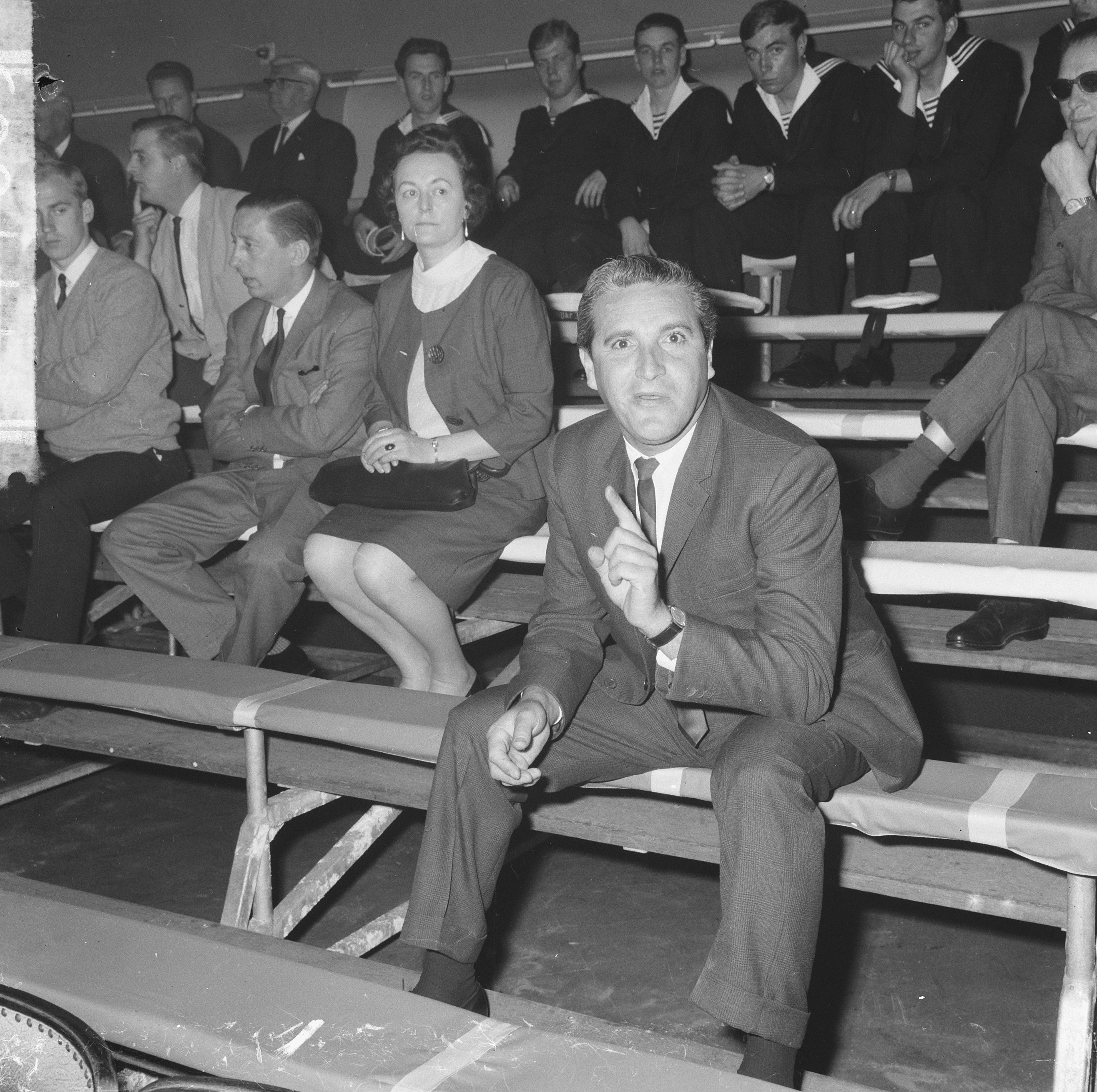 Collectie / Archief : Fotocollectie Anefo Reportage / Serie : [ onbekend ] Beschrijving : 1965 World Three-cushion Championship, Adolfo Suarez from Peru was not allowed to participete, so he has to sit and watch! Datum : 12 mei 1965 Locatie : Hilversum, Netherlands Trefwoorden : biljarten, tribunes Persoonsnaam : Adolfo Suarez (PER) Fotograaf : Nijs, Jac. de / Anefo Auteursrechthebbende : Nationaal Archief Materiaalsoort : Negatief (zwart/wit) Nummer archiefinventaris : bekijk toegang 2.24.01.03 Bestanddeelnummer : 917-7605